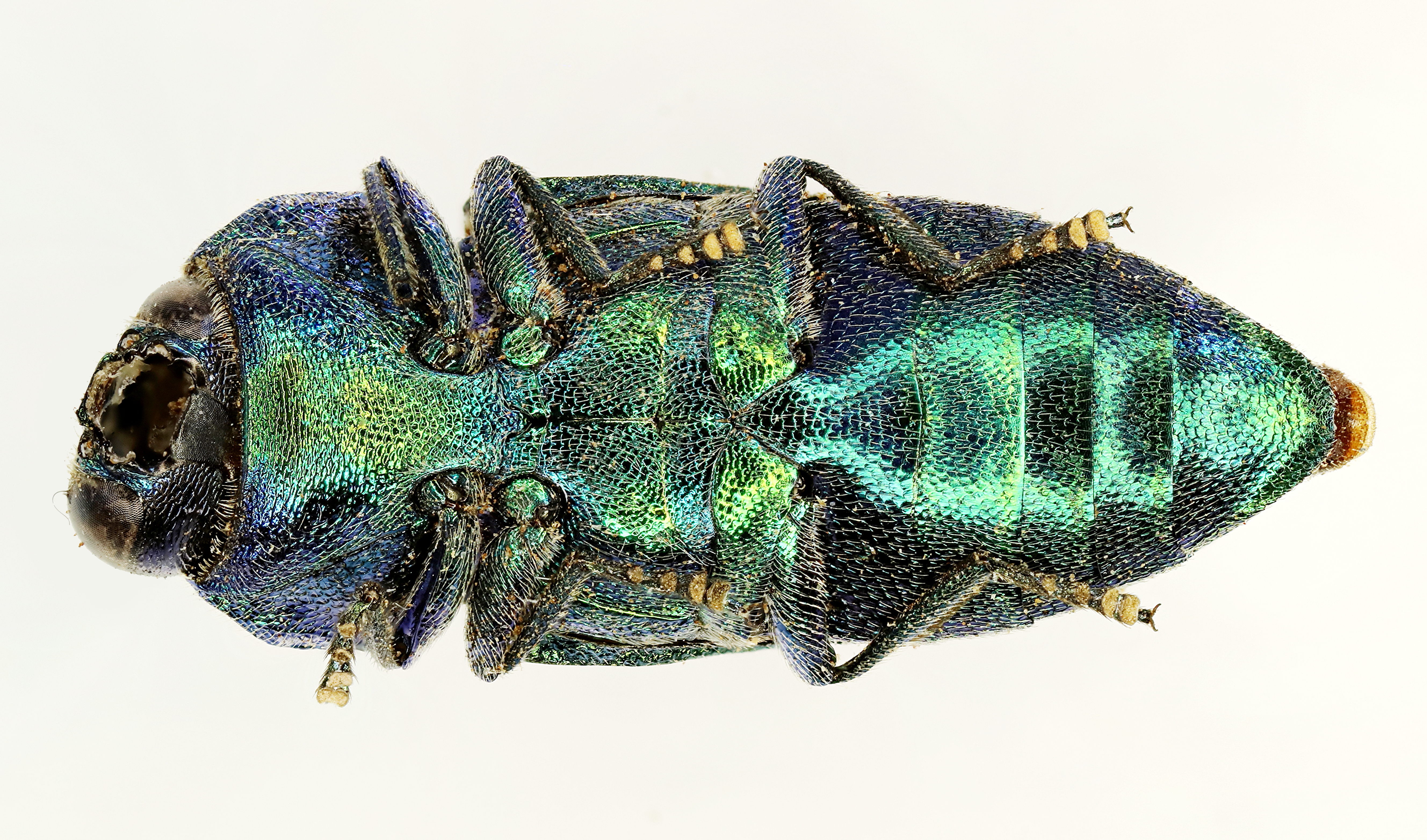 Unterseite eines beschädigten Totfundes von Anthaxia passerinii vom Peloponnes im Mai 2016